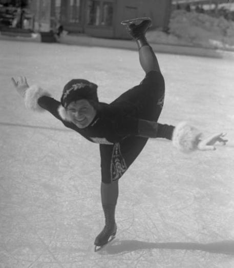 Sonja Henie's grösste Gegnerin auf der Winterolympiade in Lake Placid, Amerika! Maribel Vinson [*], die beste amerikanische Eiskunstläuferin gewann in New York zum vierten Mal hintereinander die amerikanische Kunstlaufmeisterschaft für Damen. Sie ist in Lake Placid die schärfste Gegnerin der Weltmeisterin Sonja Henie. [* Das Foto zeigt Beatrix Loughran, vermutlich bei den II. Olympischen Winterspiele in St. Moritz / Schweiz im Februar 1928]